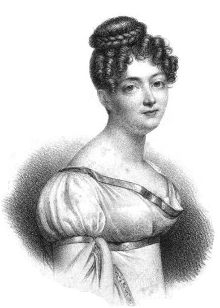 Mlle Cochelet